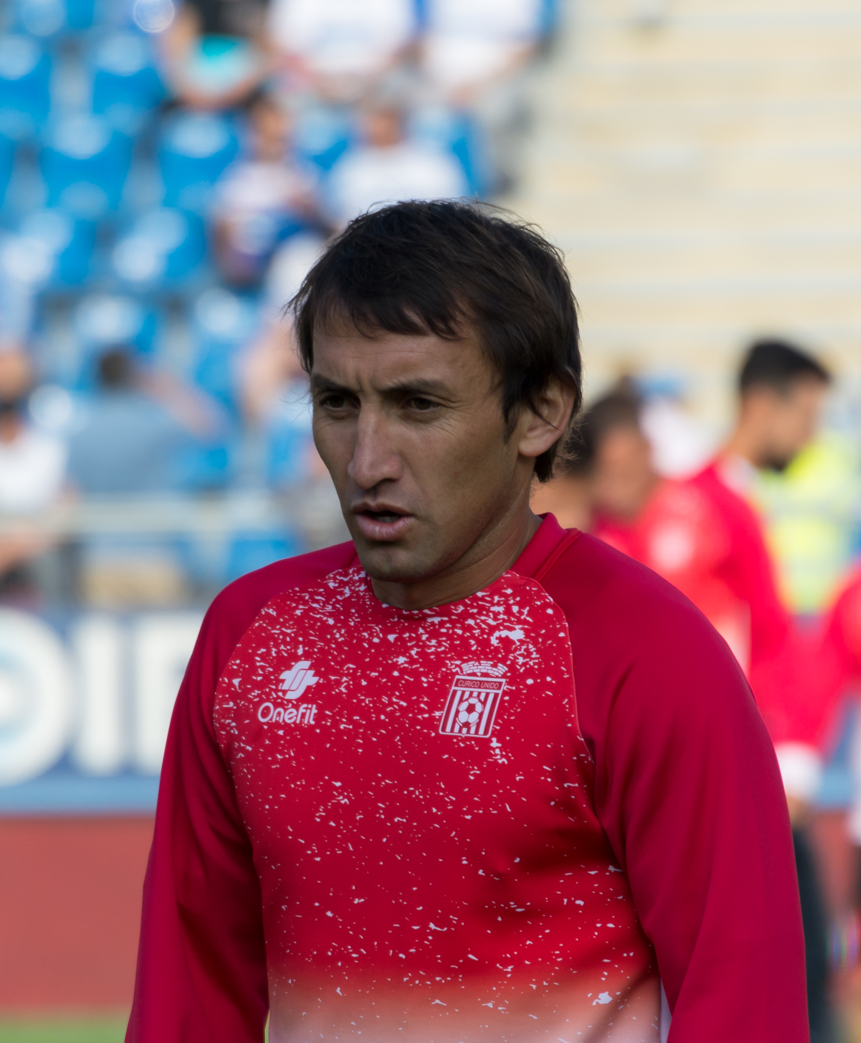 Gabriel Vargas, Universidad Católica v Curicó Unido, Estadio San Carlos de Apoquindo, Las Condes, Santiago, Región Metropolitana, Chile.